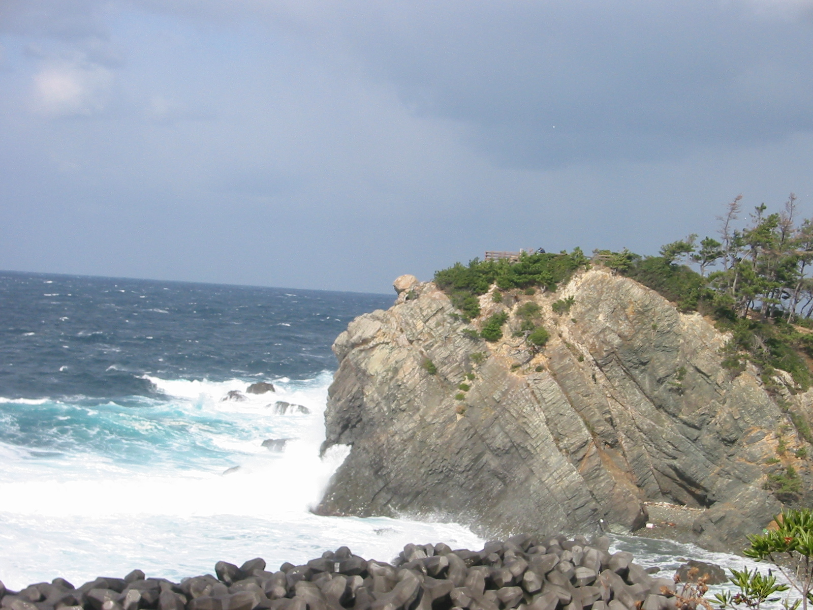 日御碕 特徴的な岩肌、隆起海岸